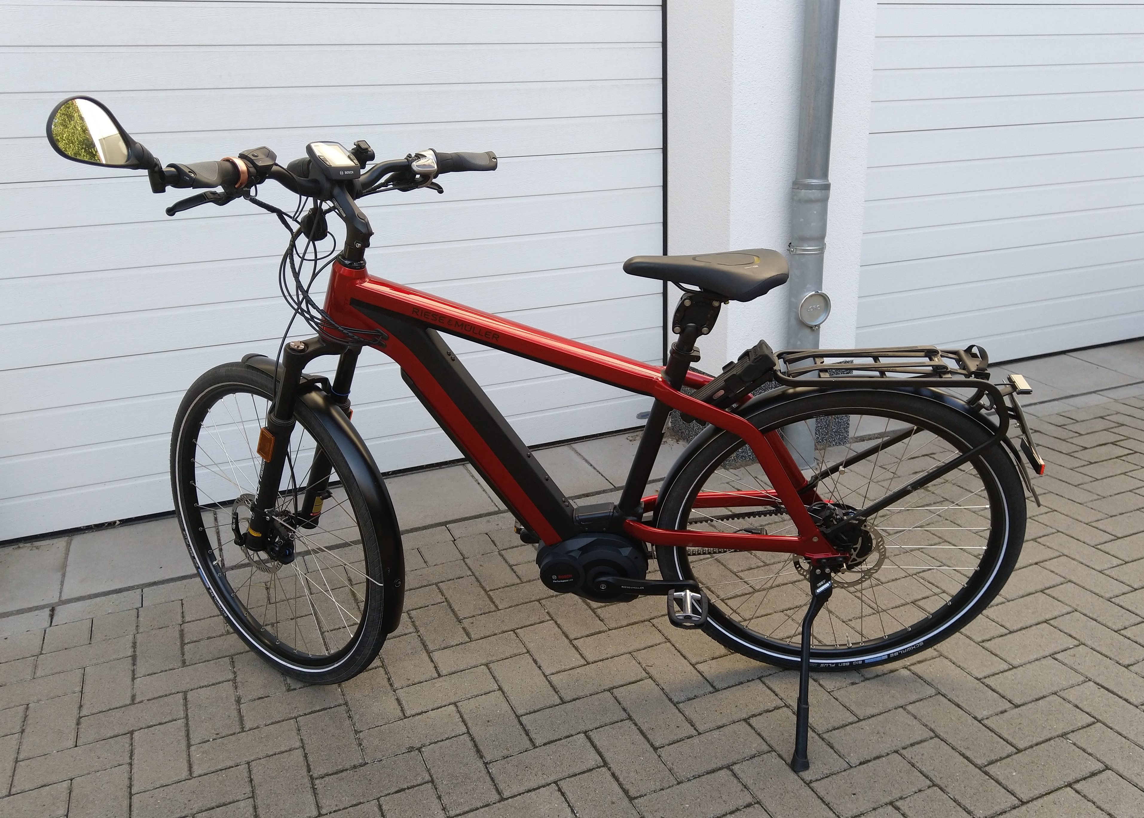 Das Riese & Müller New Charger S-Pedelec mit NuVinci Schaltung, Magura Scheibenbremsen und Bosch Performance Motor